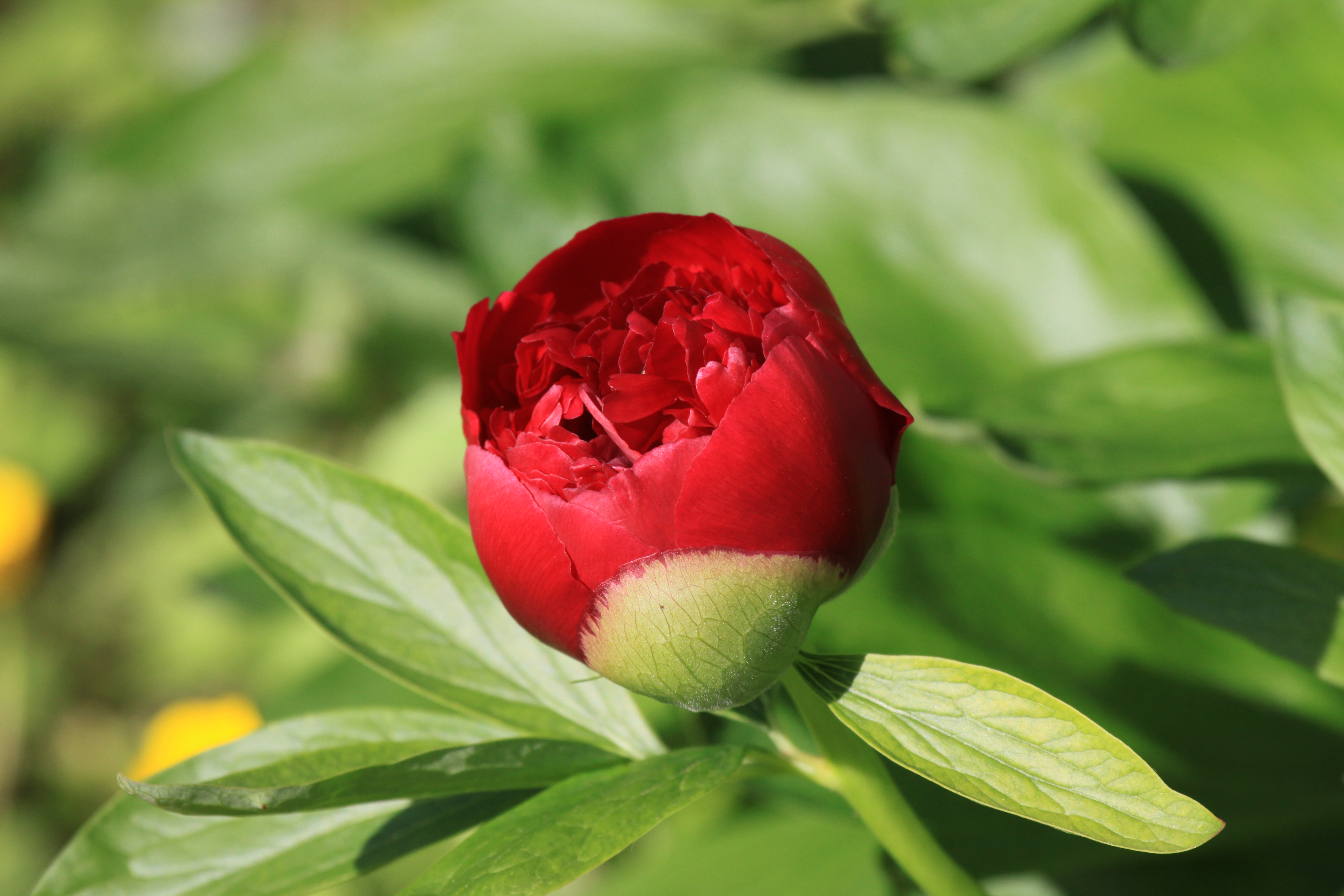 Une pivoine officinale dans un jardin à La Rochelle (France).